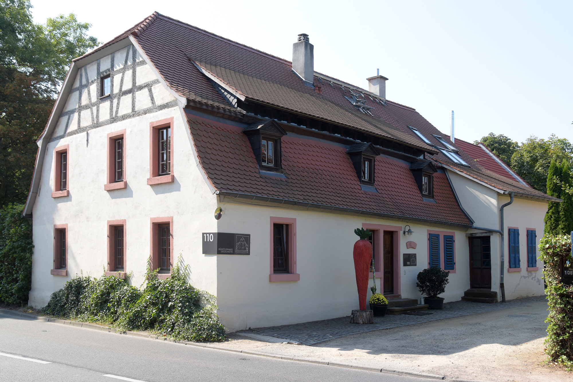 Denkmalgeschütztes Gebäude in Darmstadt, Kranichsteiner Straße 110